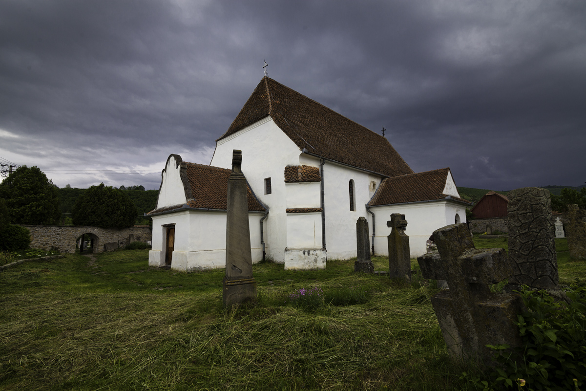 A kápolna a templomkertből fotózva 01